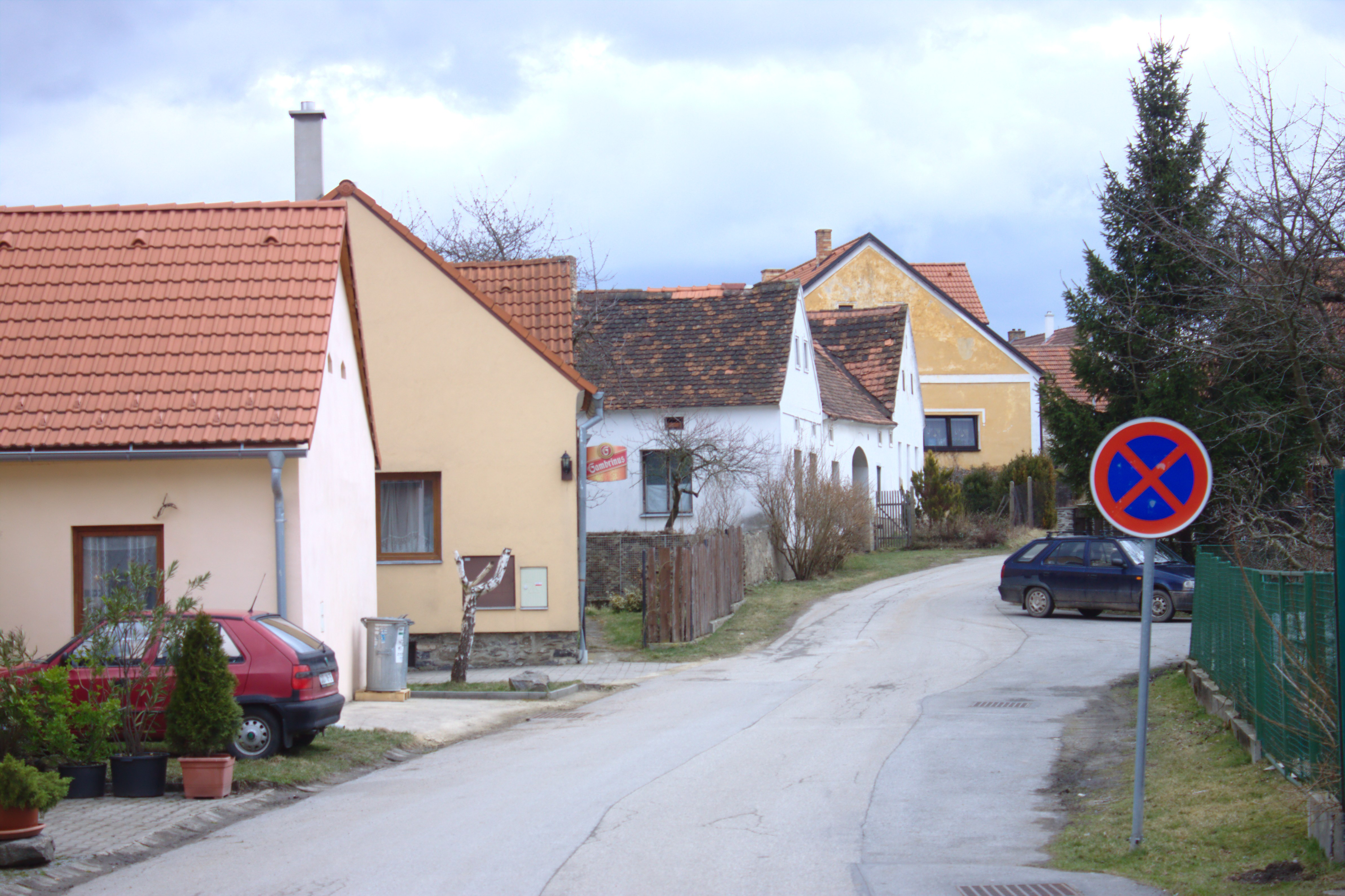 Silnice ve vesnici Dolní Třebonín Project: Fotíme Česko